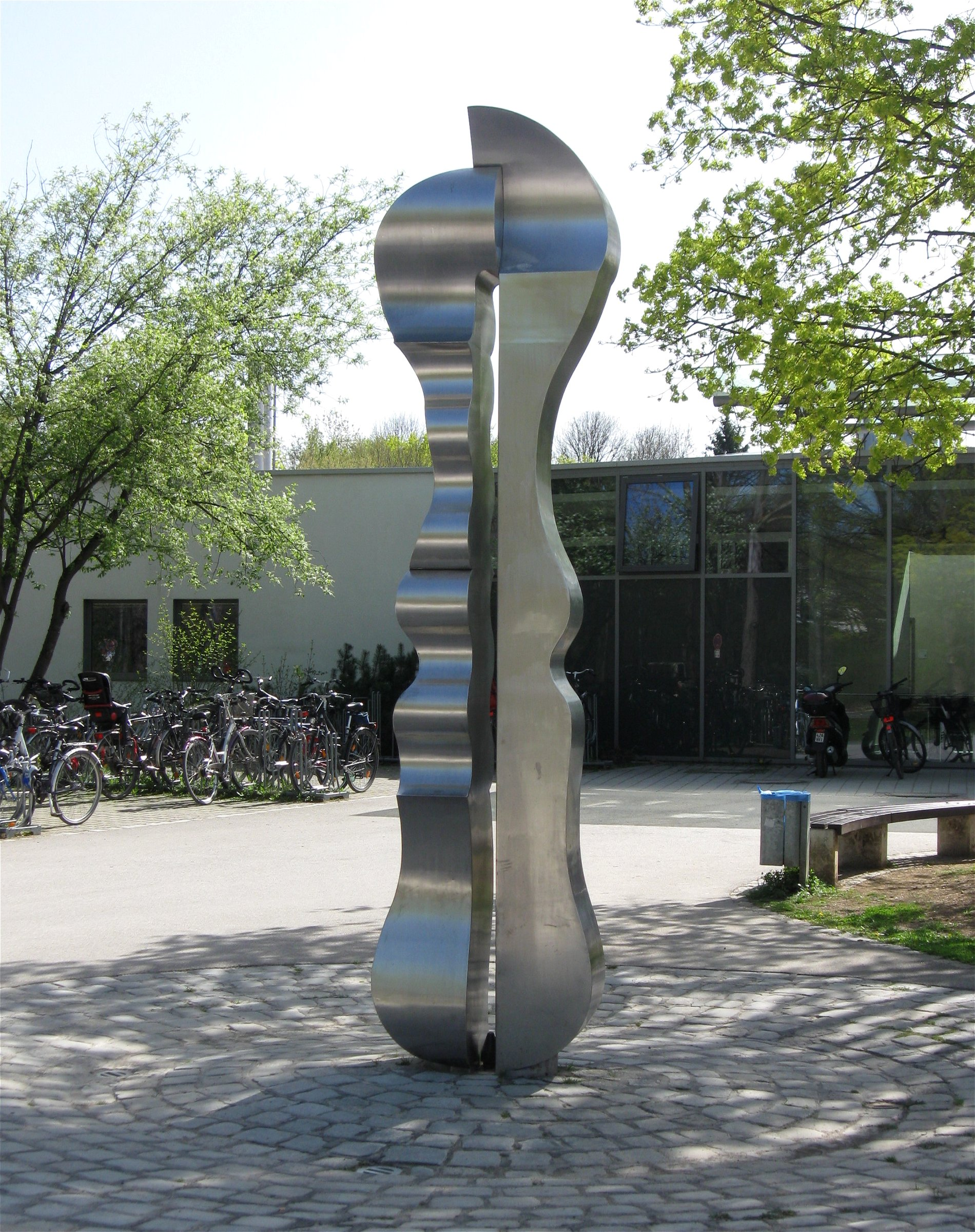 Hans Rucker: Eisernes Paar, 1976, Michaelibad, München